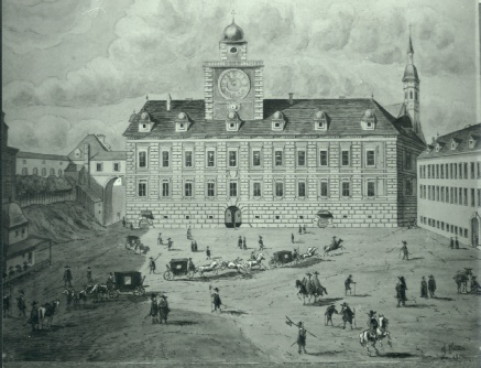 Hofburg_Innerer_Burgplatz_1652